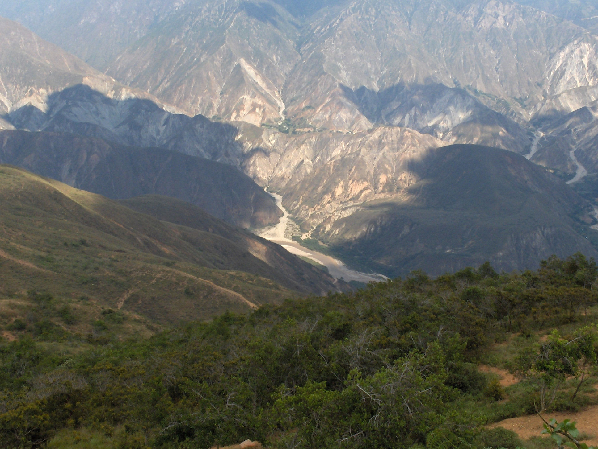 El cañon del chicamocha